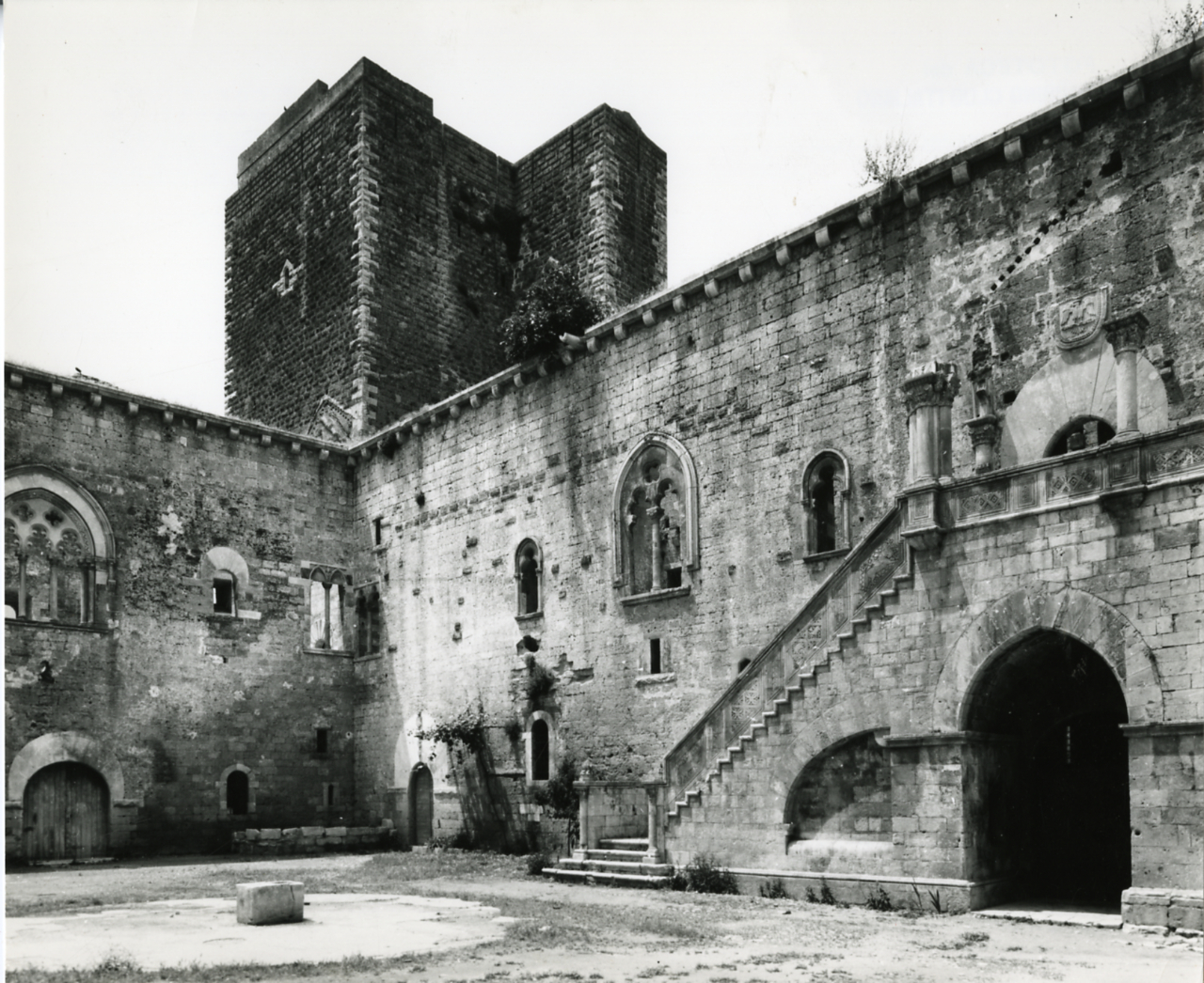 Servizio fotografico : Monte Sant'Angelo, 1970 / Paolo Monti. - Stampe: 19 : Positivo b/n, gelatina bromuro d'argento/ carta, 24x30. - ((Al verso delle stampe iscrizioni manoscritte e numeri di negativo corrispondente: 1195, 1118, 11723, 1237, 222, 212, 213, 16170, 1242, 1196, 1204, 1460, 11754. Al verso di sei stampe timbro a inchiostro: "Fototeca del/ Touring Club Italiano". Sul coperchio della scatola iscrizione manoscritta a pennarello: "Castelli"